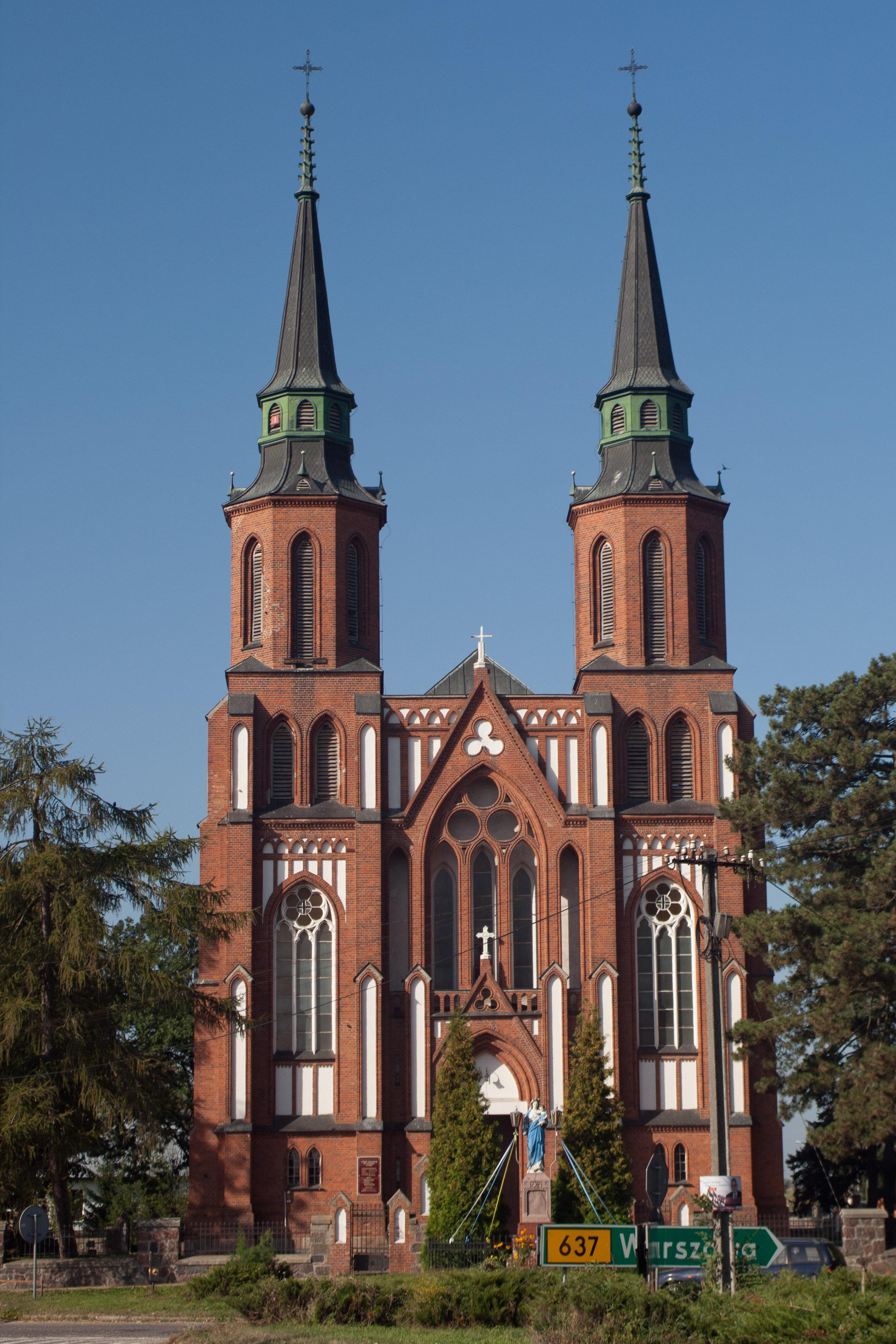 Liw - kościół par. p.w. św. Leonarda, 1905-1907